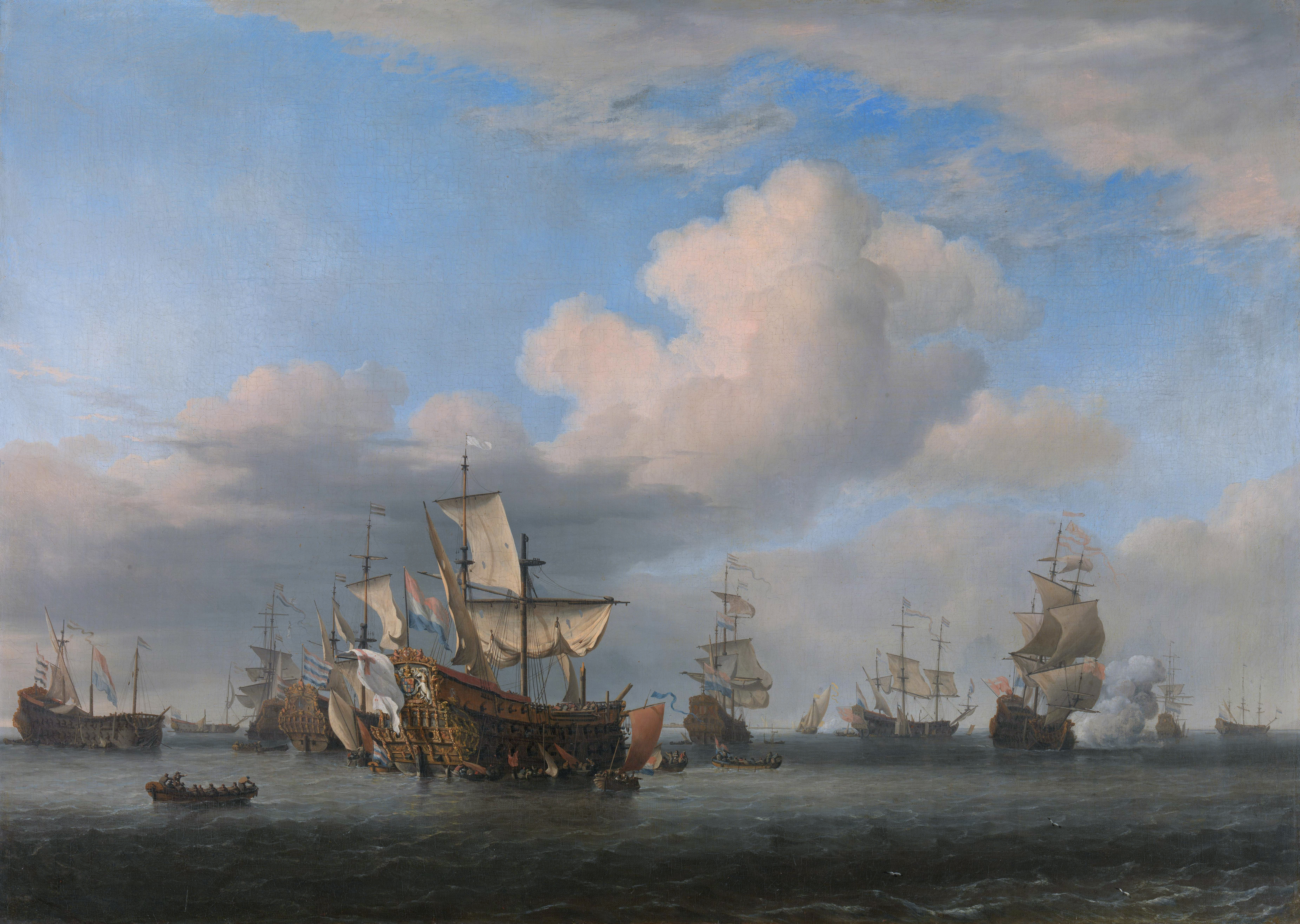 Pendant of File:Willem van de Velde (II) - De verovering van het Engelse admiraalschip de 'Royal Prince'.jpg.